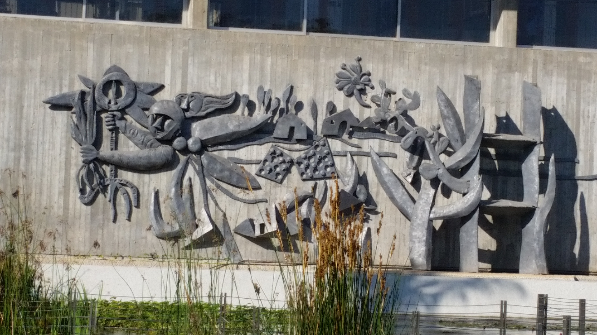 תבליט הקיר האמנותי "נושאי האור", נקבע על בניין "היכל התרבות" בכפר סבא, ובא להקדיש את הקיר לזכרם של תושבי כפר סבא ובוניה, לוחמיה ומגניה.